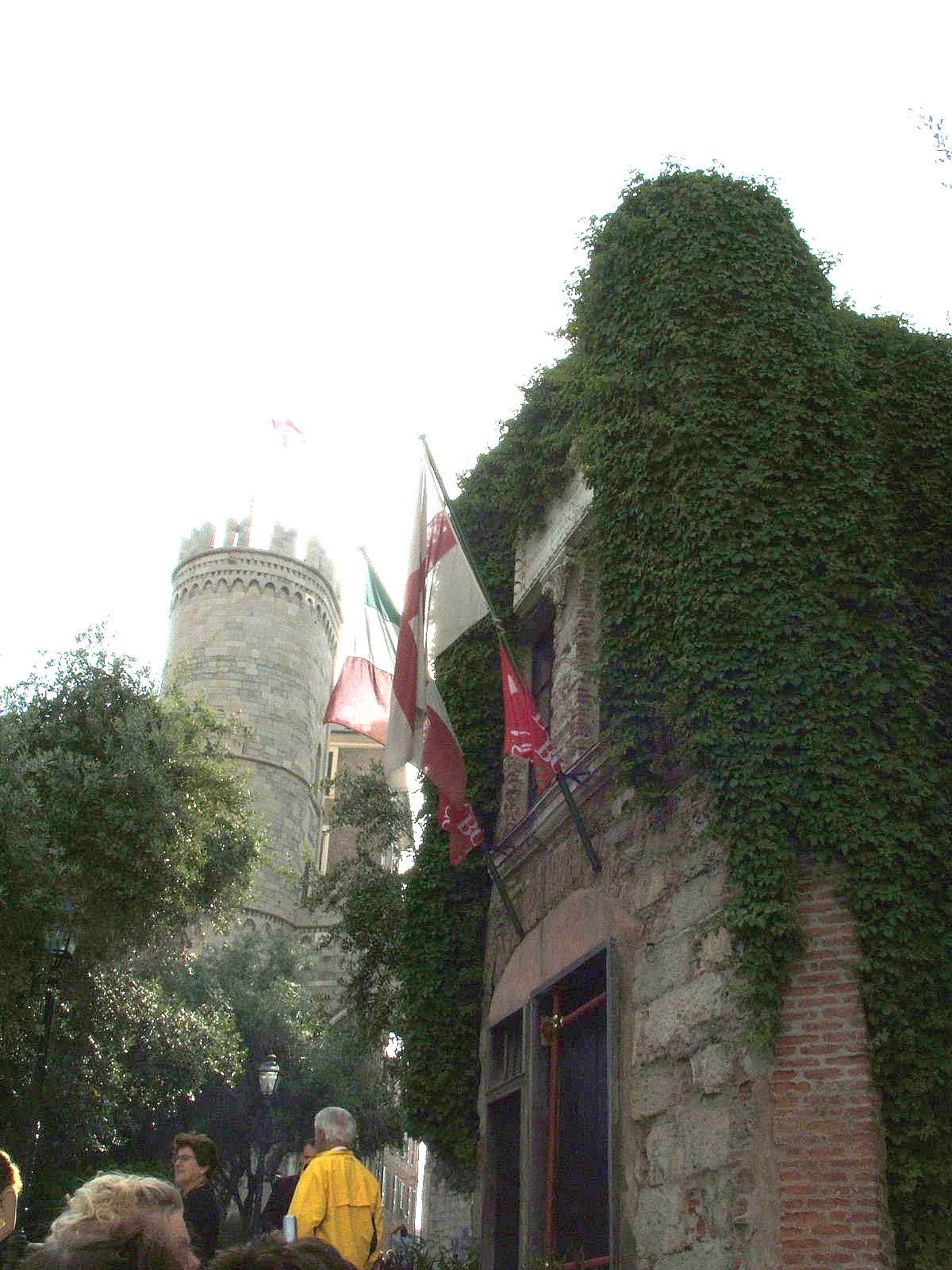 Genova, Piano di Sant'Andrea, casa di Cristoforo Colombo (Christopher Columbus)